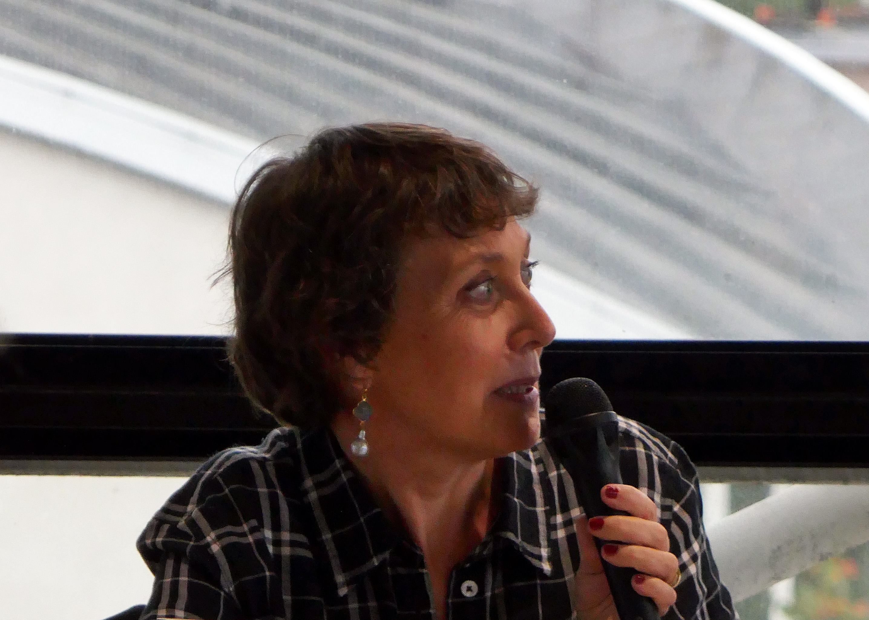 Gaëlle Josse au Festival international de géographie 2019 à Saint-Dié-des-Vosges.